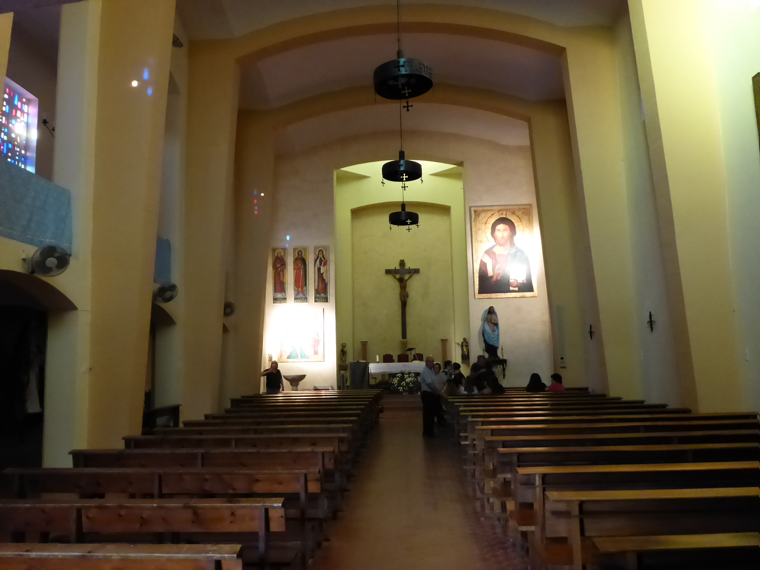 Guadalcacín, Jerez (Andalucia, España)